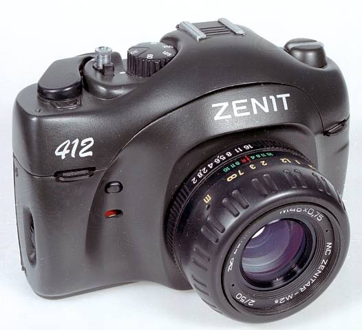 Фотоаппарат ЗЕНИТ-412DX